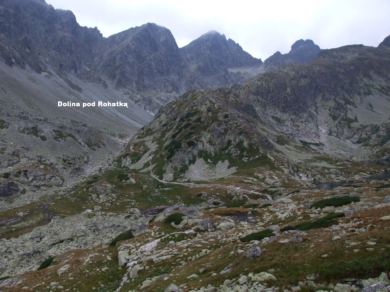 Dolina pod Rohatką - odgałęzienie Doliny Staroleśnej w słowackich Tatrach Wysokich